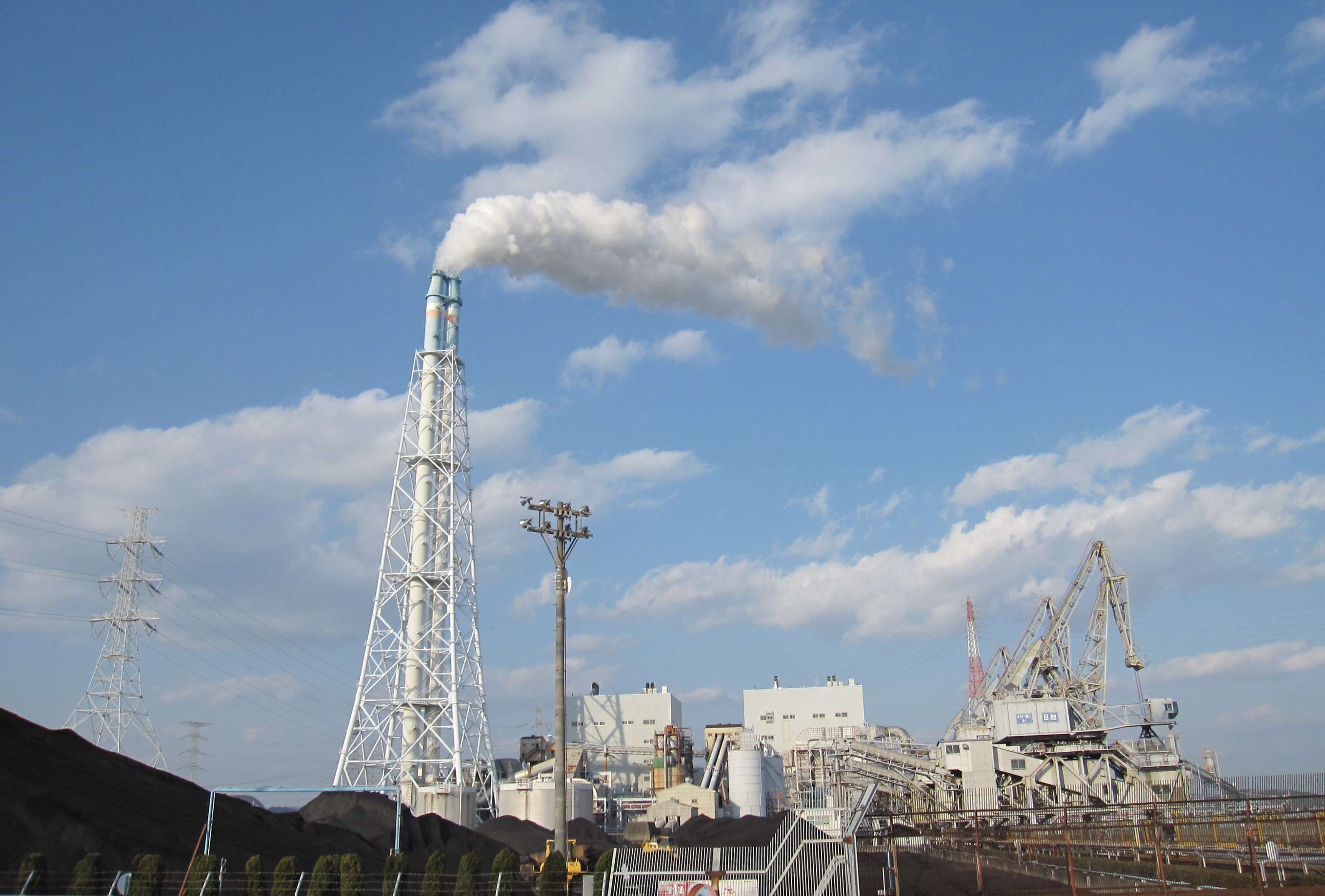 電源開発高砂石炭火力発電所